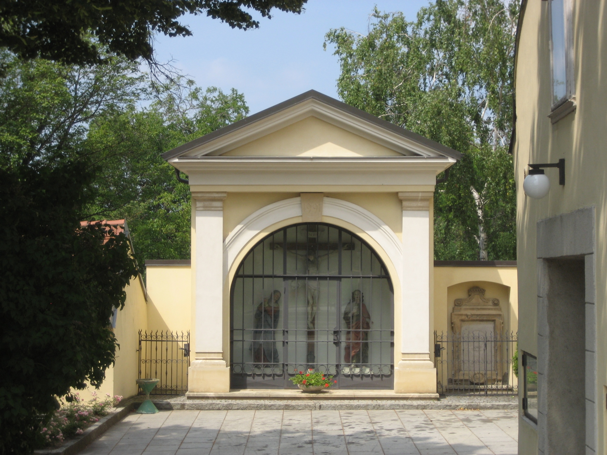 Kreuzigungsgruppe in 1210 Wien